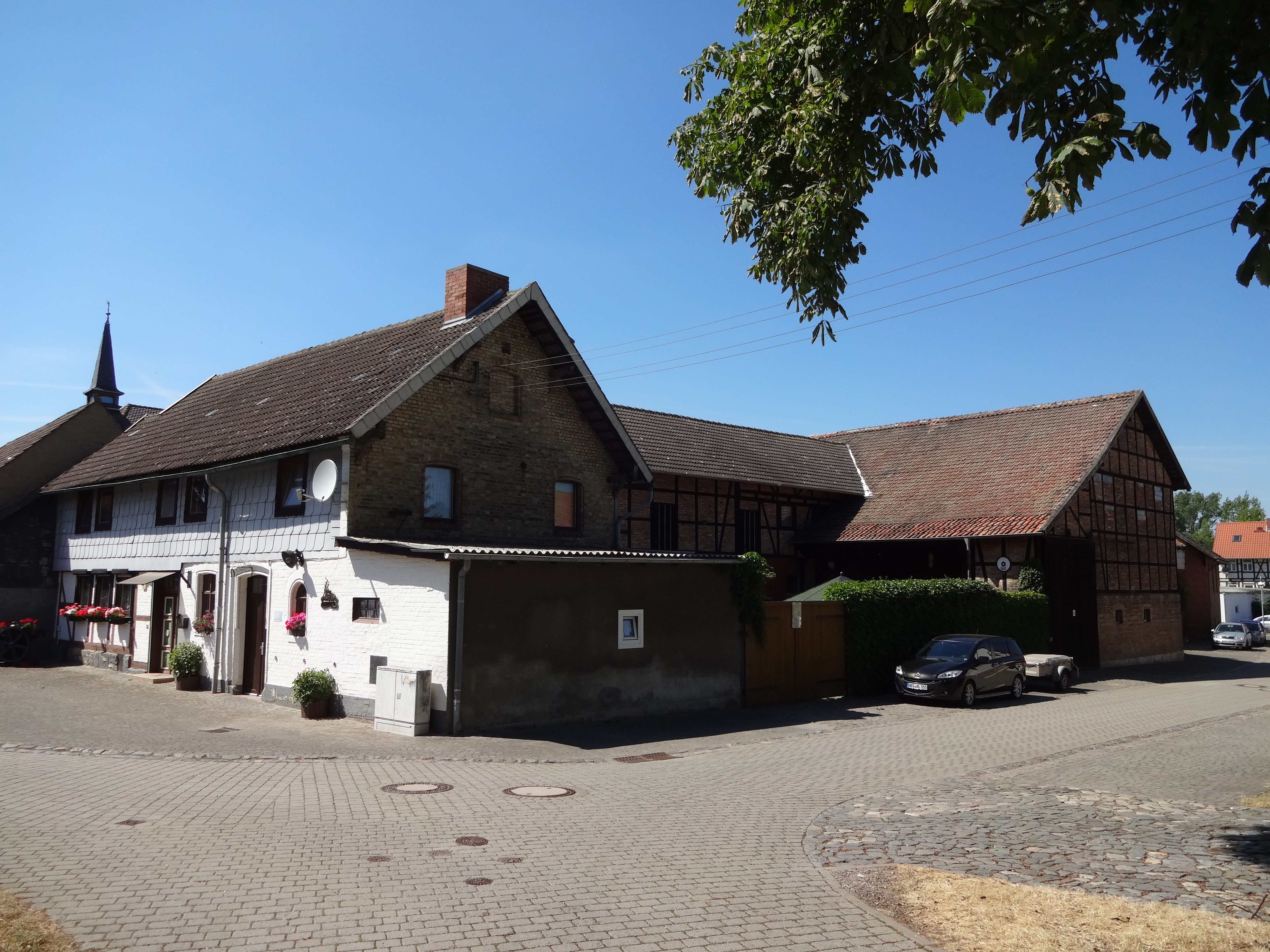 denkmalgeschützter Bauernhof in der Straße Rendelberg 9 in Dedeleben